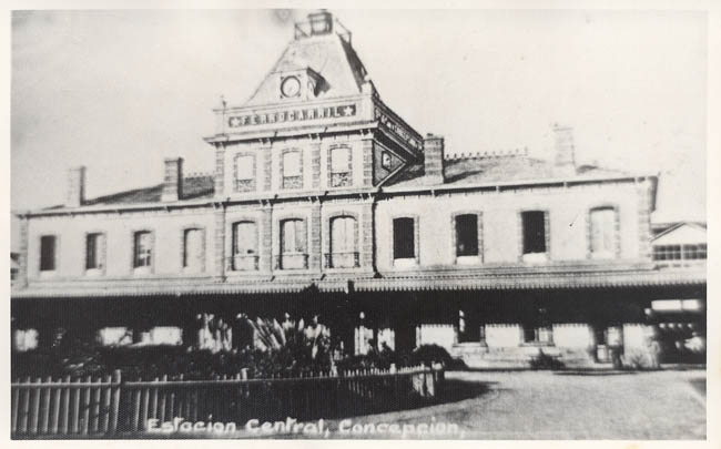 Tarjeta postal de la Antigua Estación Central de Concepción, Chile